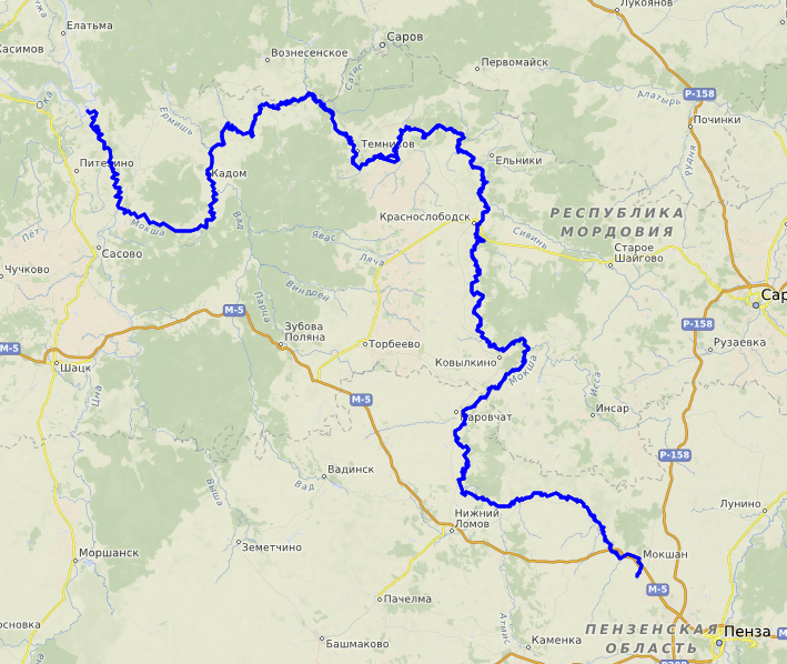 carte réalisée sur umap This map may be incomplete, and may contain errors. Don't rely solely on it for navigation.